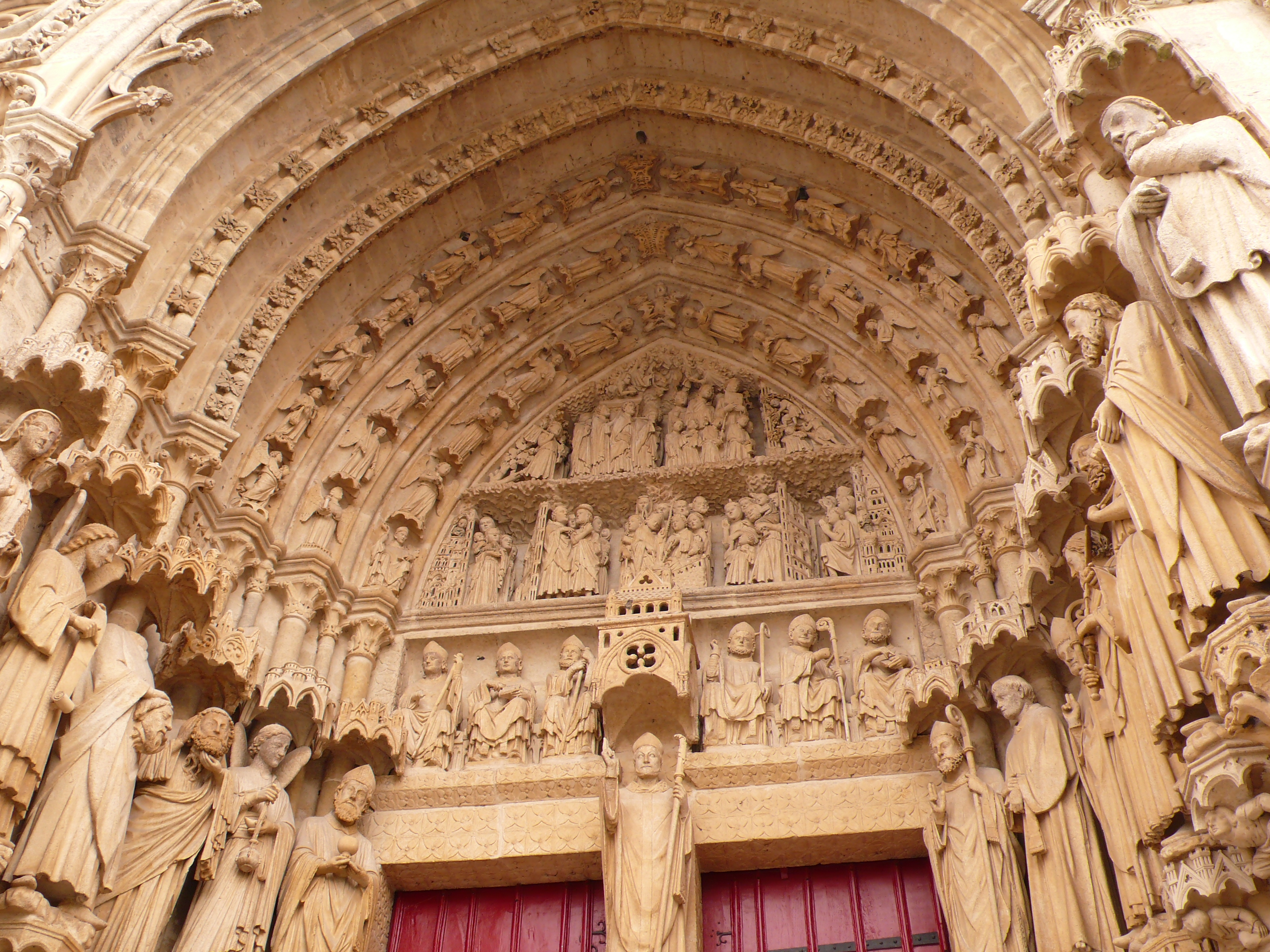 Kathedrale von Amiens, Frankreich, Westfassade, Linkes Portal (St. Firmin)